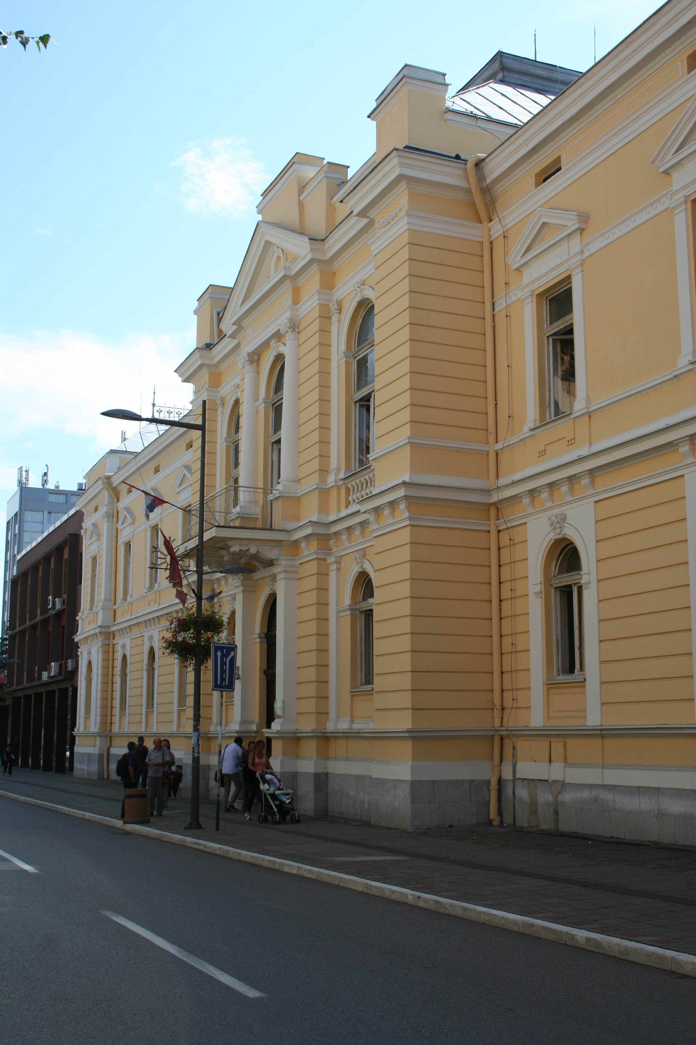 Zgrada opštinskog suda, Valjevo